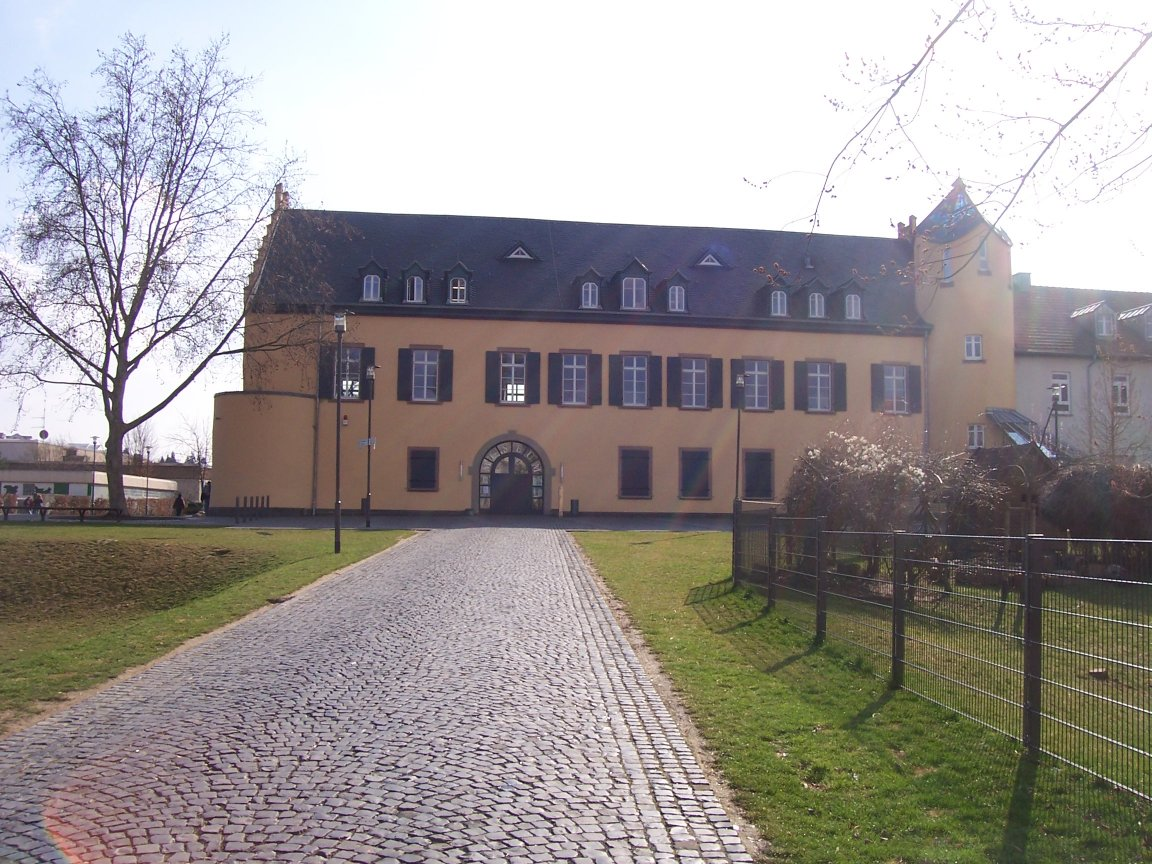 Gau-Algesheim.Schloss Ardeck.